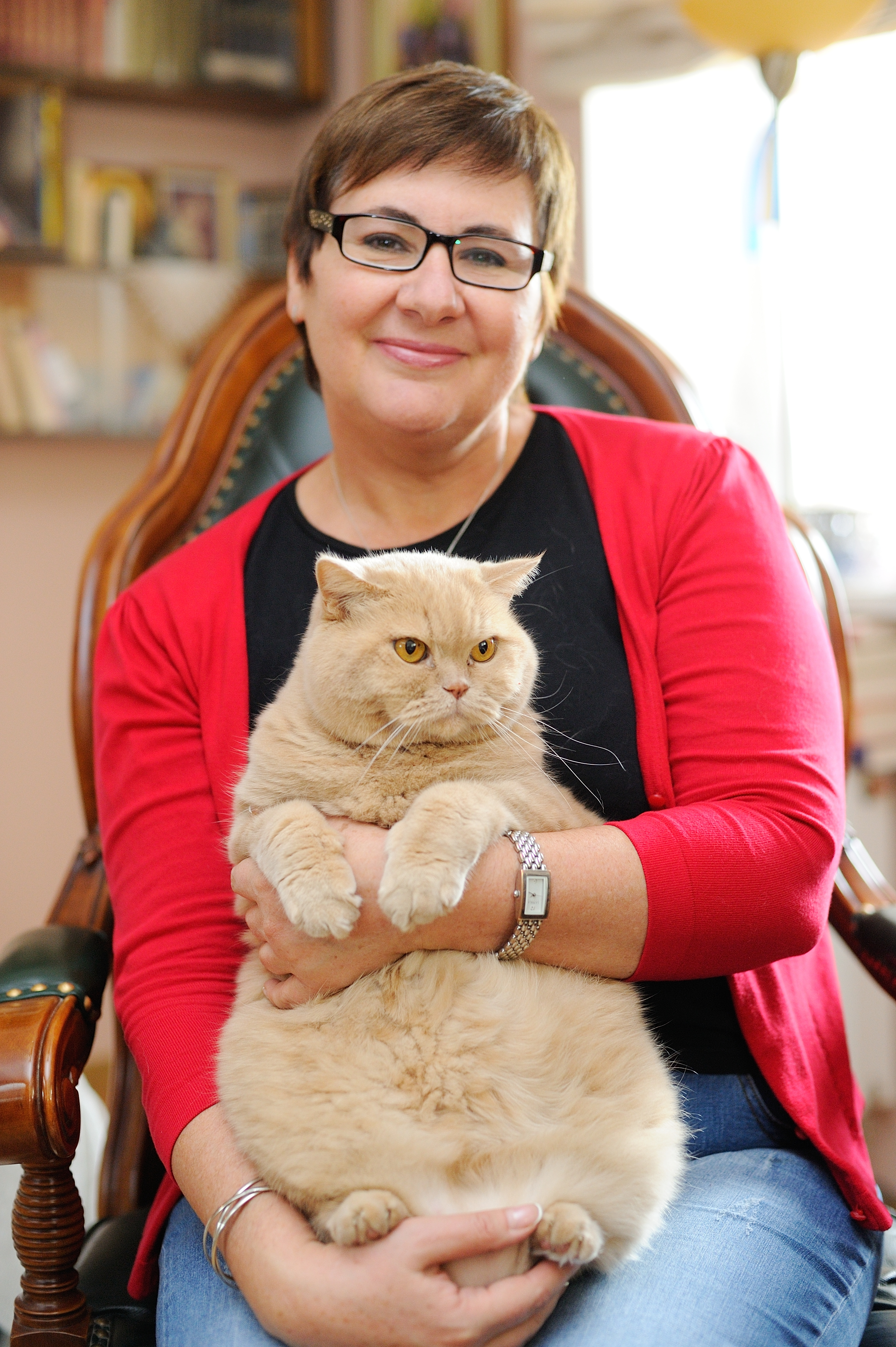 Наталка Діденко — український синоптик, телеведуча, блогер